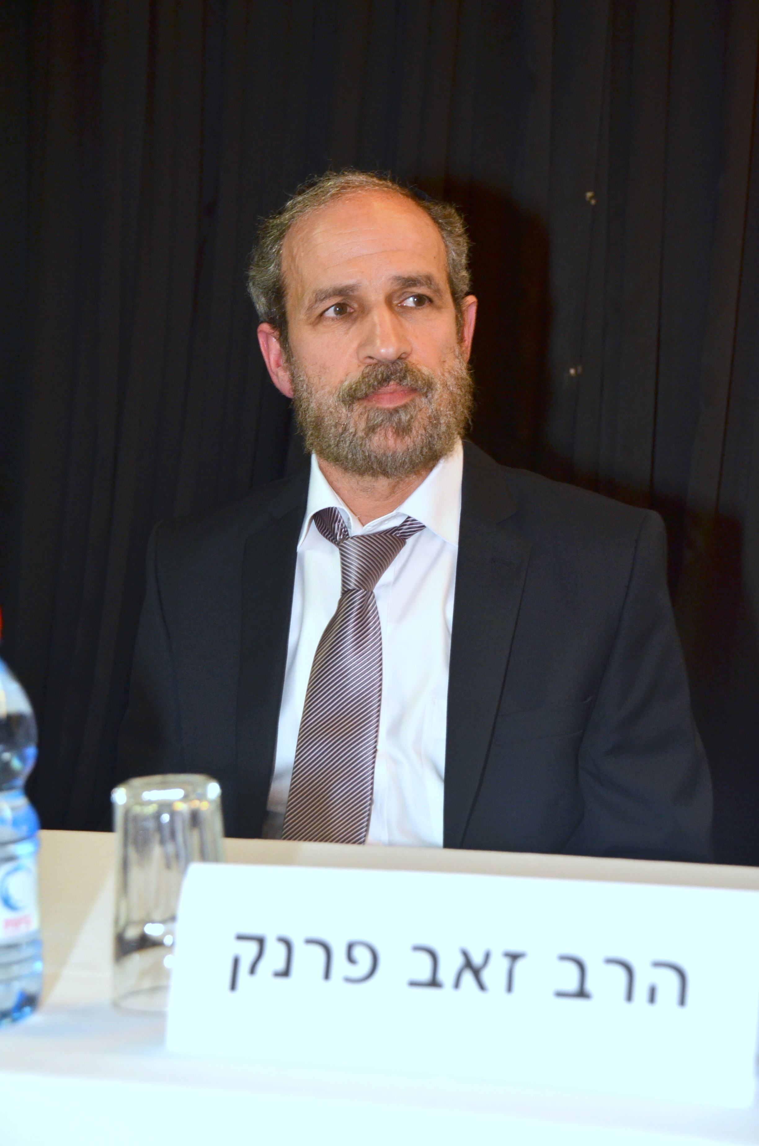 זאב פרנק בטקס קבלת פרס עמינוח על ספרו-מחקרו דבר-קטן בבית ציוני אמריקה בתל-אביב ביום ל' ניסן ה'תשע"ג 10-4-2013